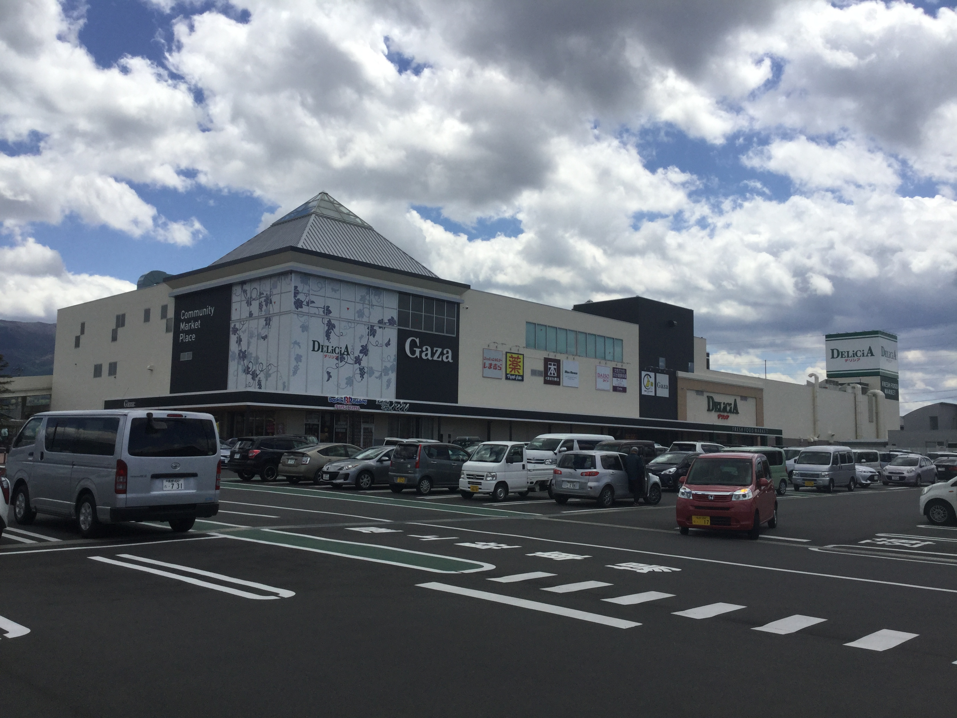 コミュニティマーケットプレイス・ギャザの写真。